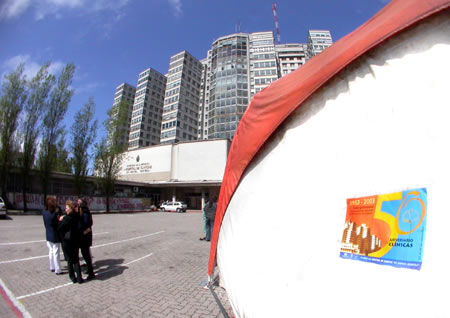 Toma del Hospital de Clínicas "Dr. Manuel Quintela".